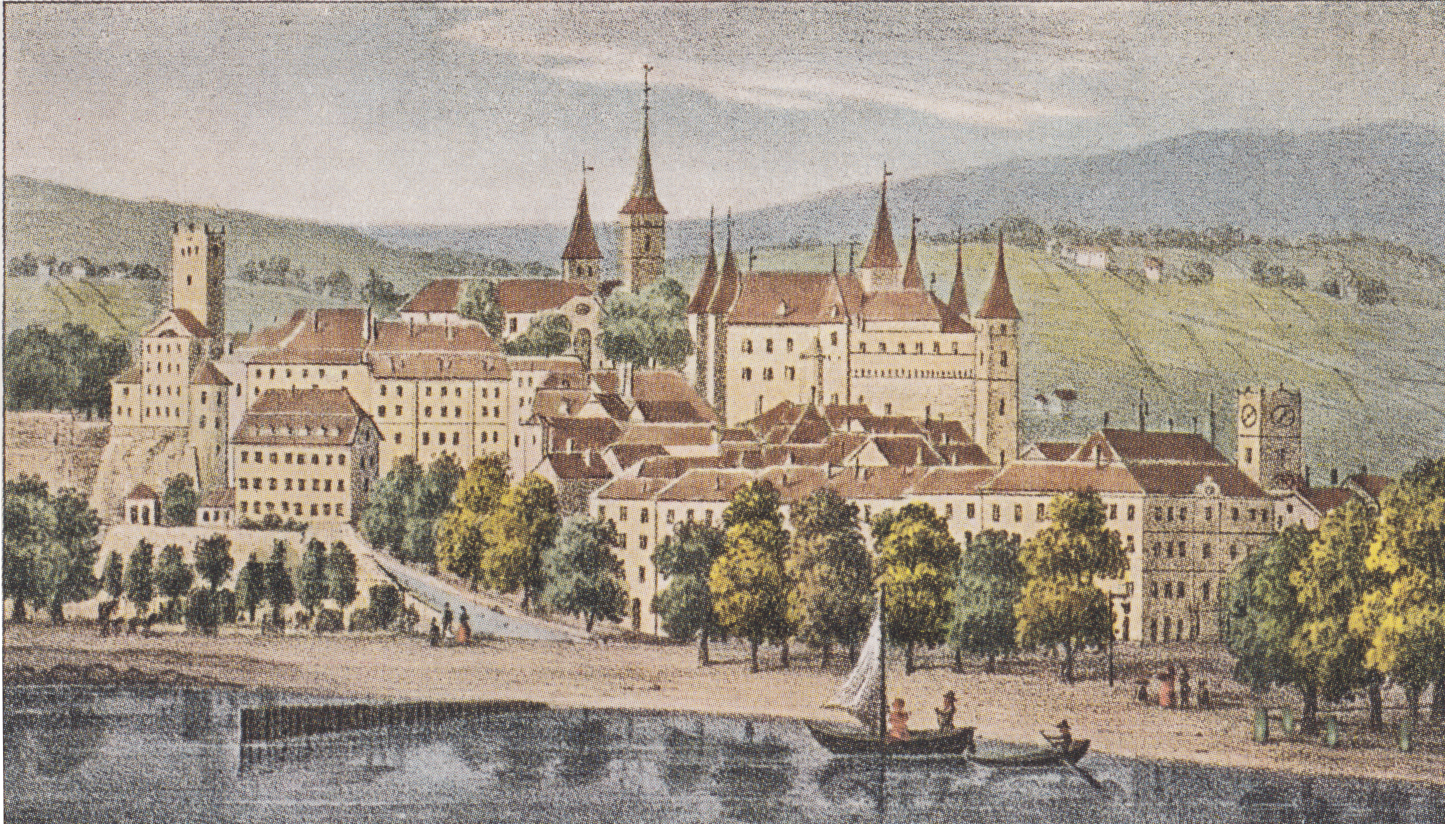 Aquarelle d'Henry Baumann représentant le chateau de Neuchâtel